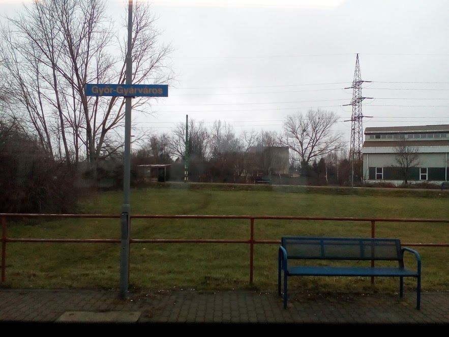 Győr-Gyárváros megállóhely és a régi Győri ipartelepek megállóhely